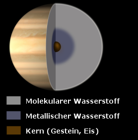 Interner Aufbau des Saturns und Größenvergleich mit Erde.